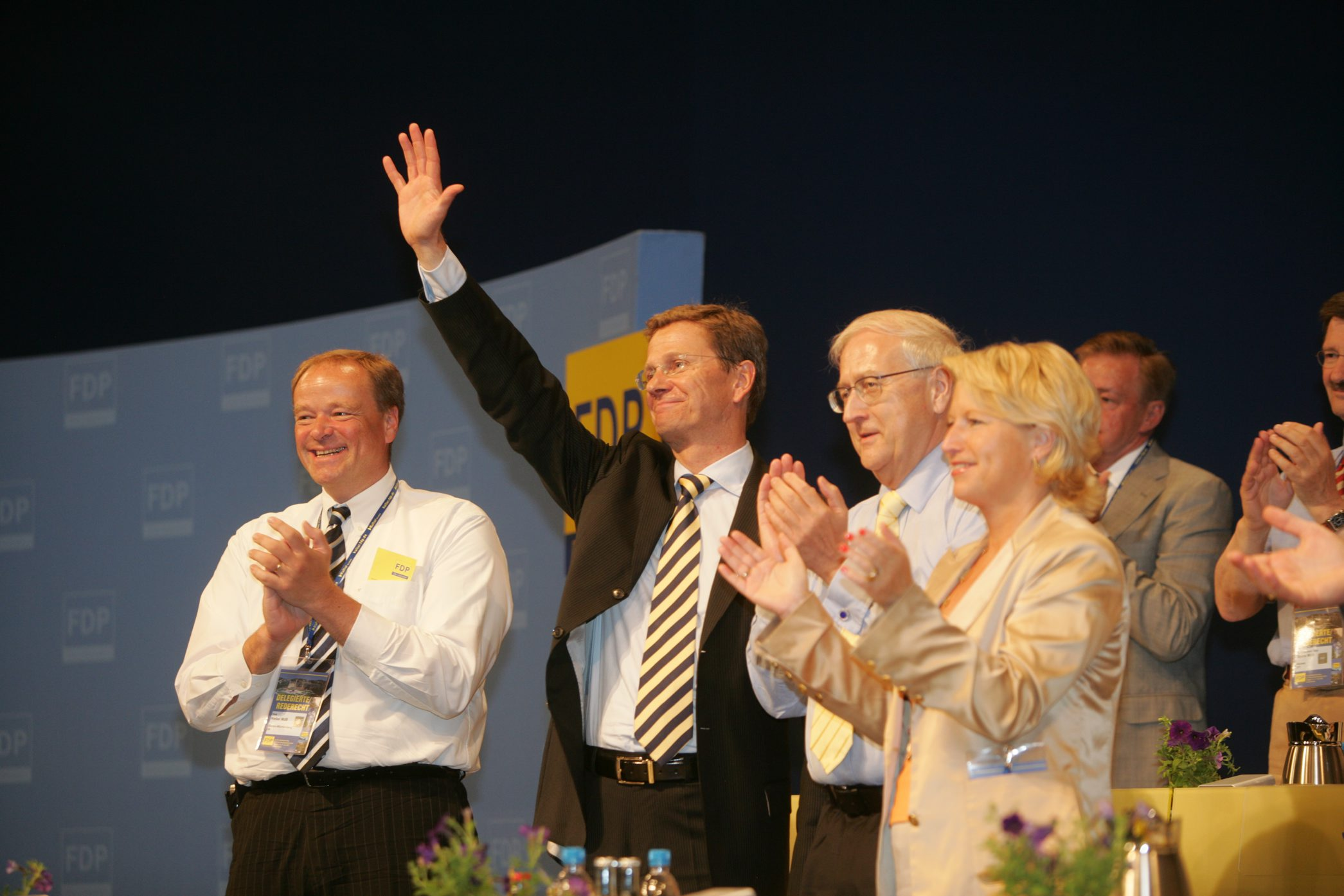 15.06.2007, Germany, Stuttgart, 58. Bundesparteitag der FDP © Frank Ossenbrink